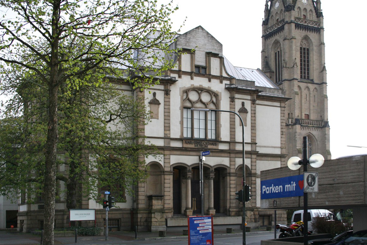 Das Karl-Ernst-Osthaus-Museum in Hagen This is a photograph of an architectural monument.